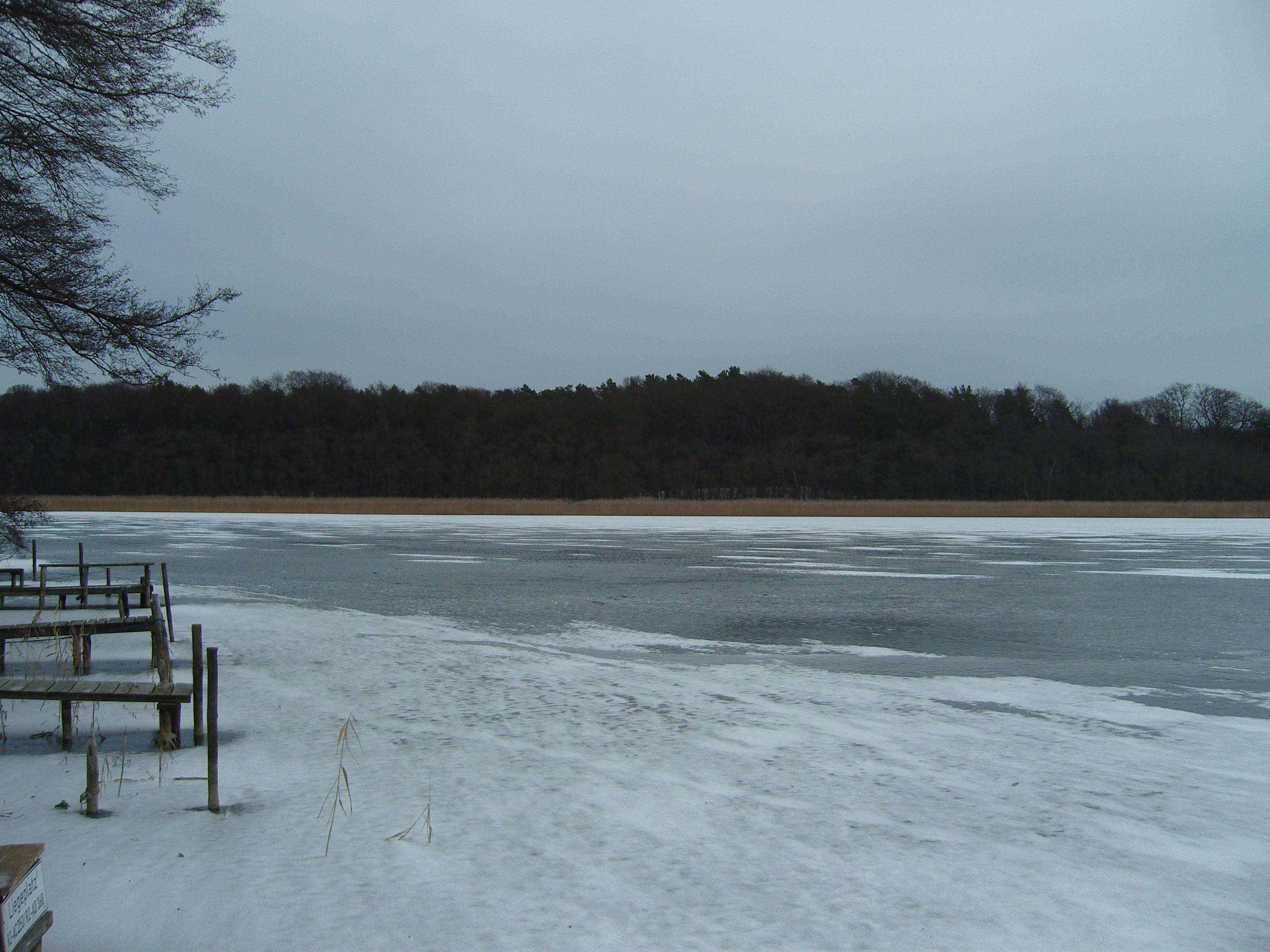 Südwestufer des Jabelschen See vom Damerower Werder (Campingplatz Heidenfriedhof) aufgenommen - Winter